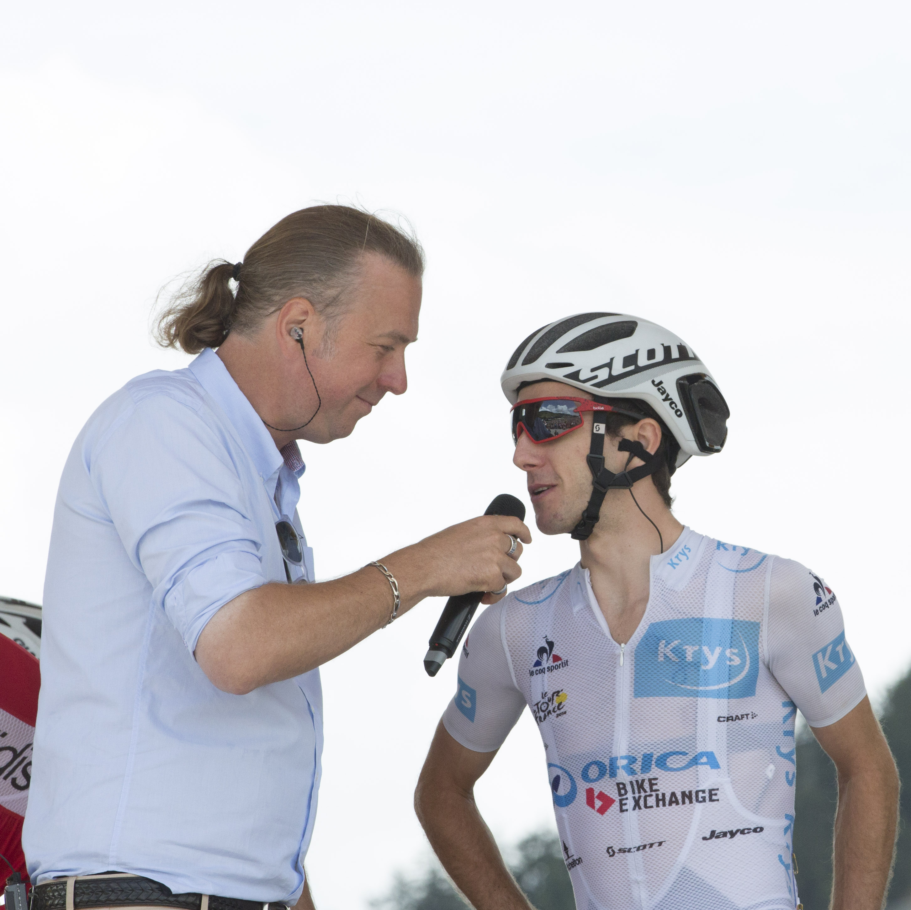 Adam Yates